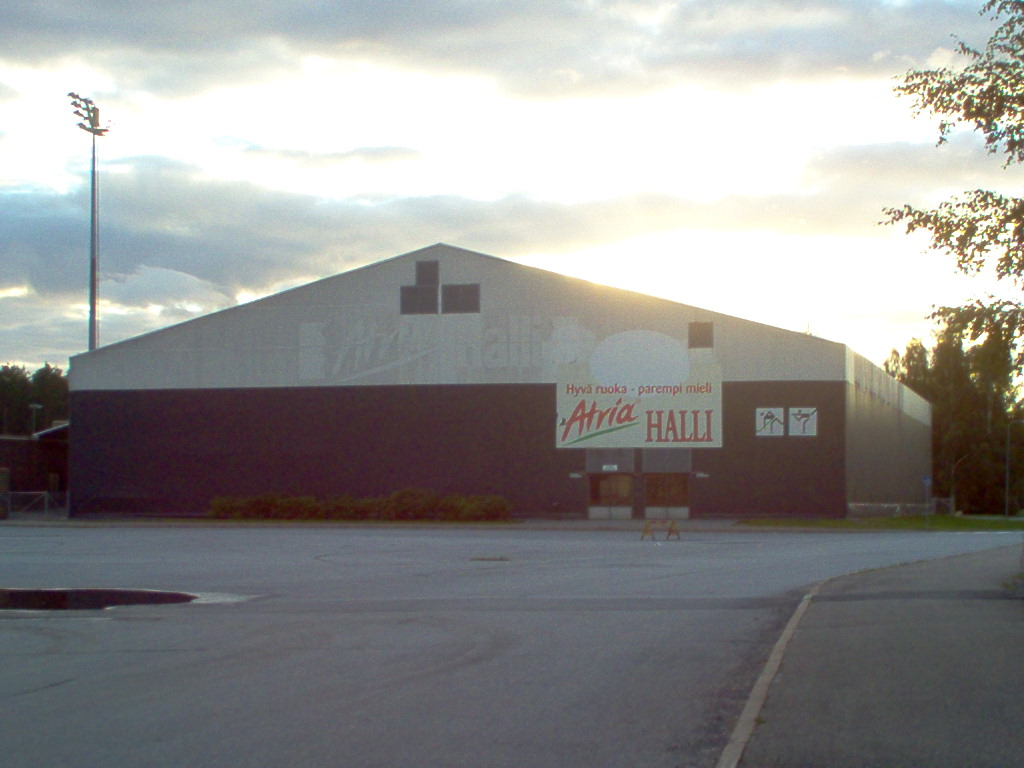 Atria-halli